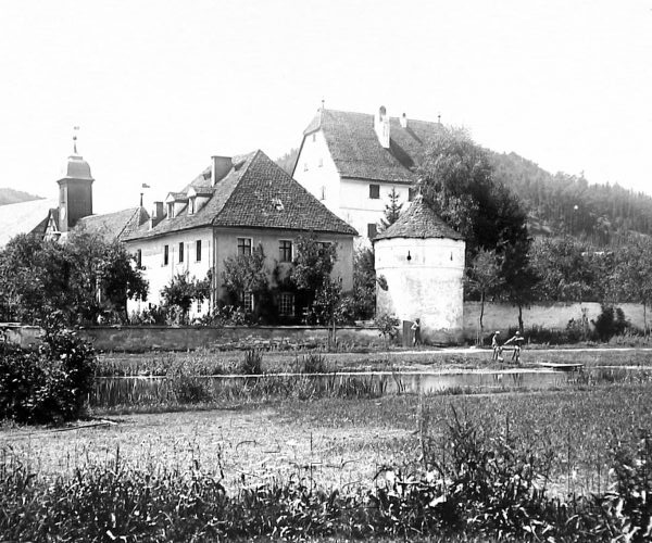 Schloss Artelshofen aus südöstlicher Richtung, Fotografie: G. v. Volckamer um 1894